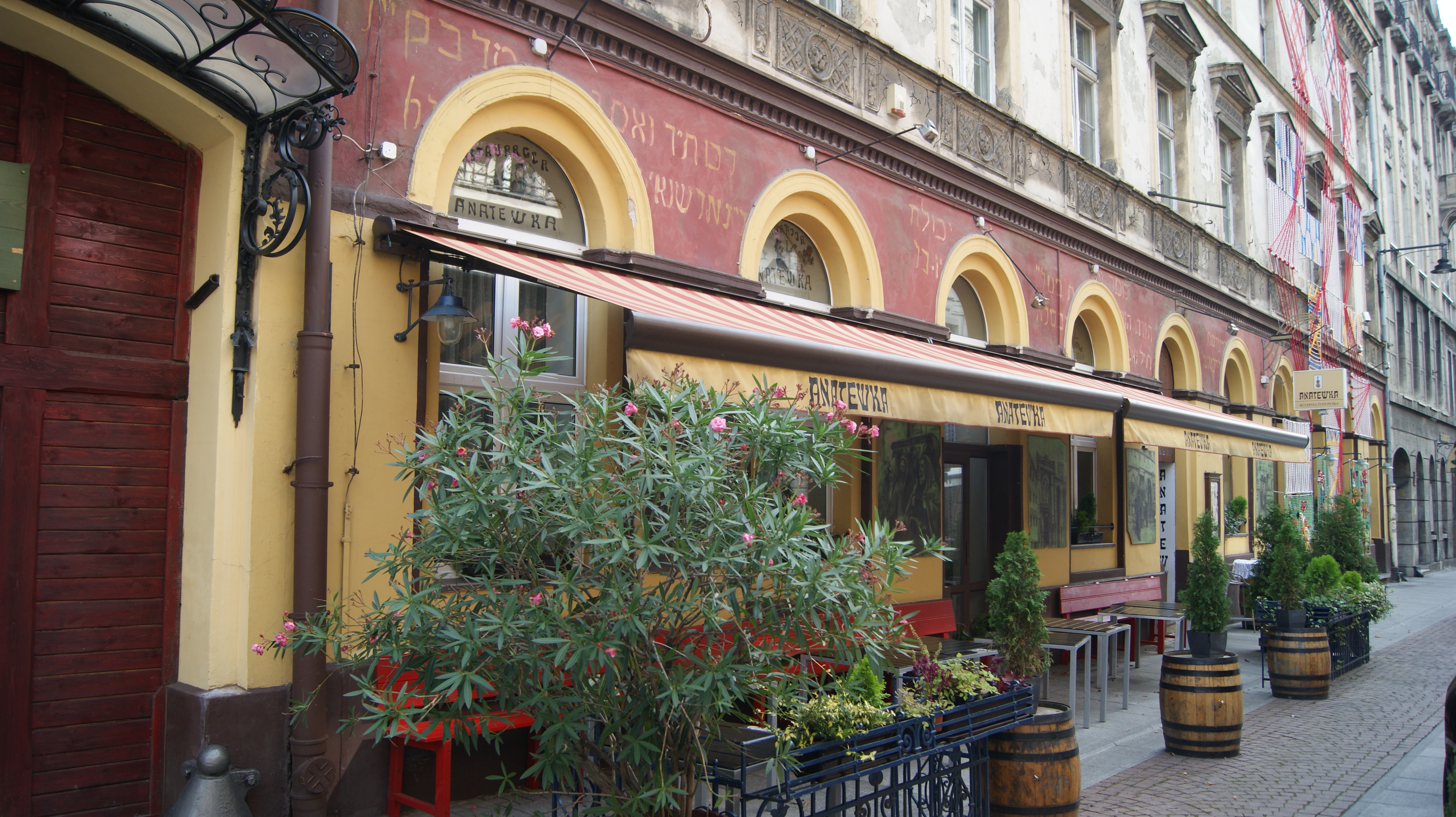 Anatewka, 6 Sierpnia, Łódź, Polska